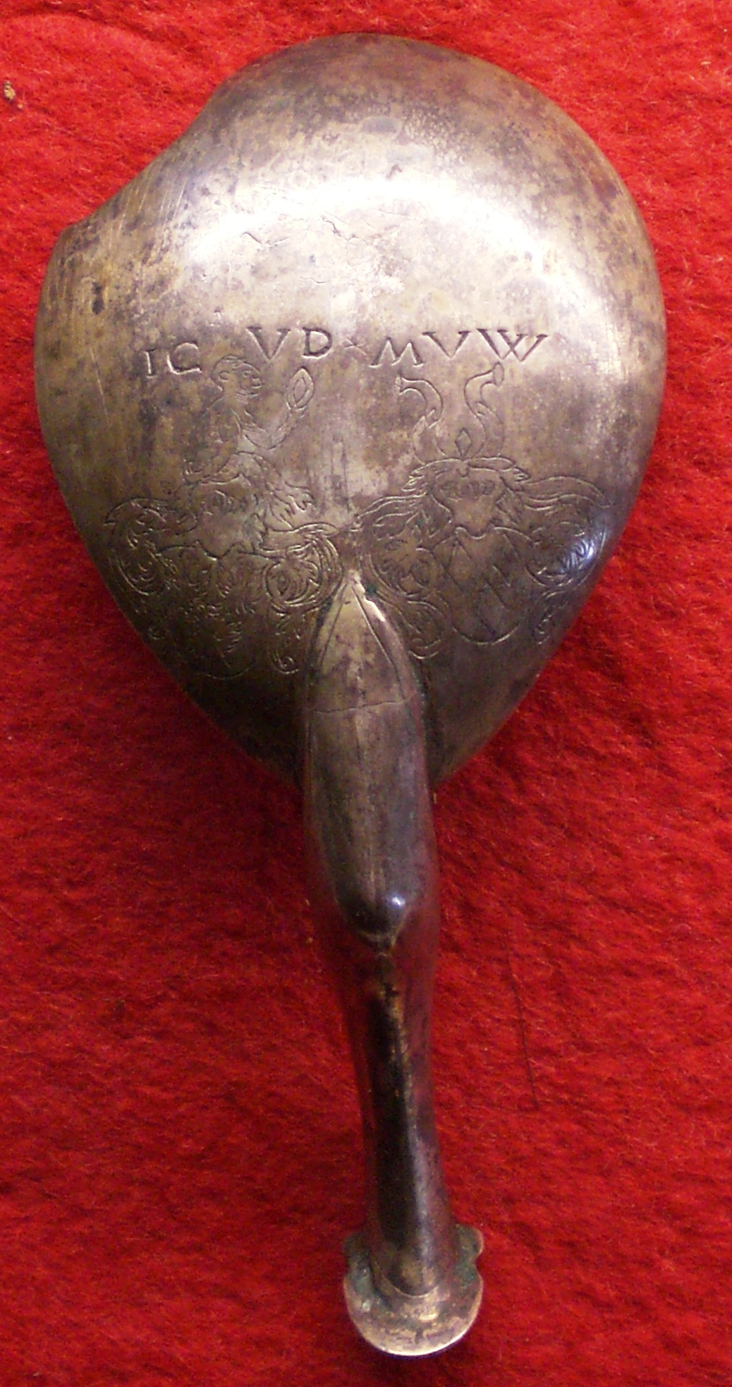 Der Löffel, welcher im Burgmuseum auf Burg Grafendahn zu sehen ist, zeigt das Wappen der Herren von Dahn. Im Schild die weißen Adler, welche auch heute noch im Wappen der Stadt Dahn zu sehen ist. Dieses Wappen ist auch in der Mauer, die den Hof der protestantischen Kirche von Birlenbach umgibt, zu sehen. Es ist in eine Grabplatte eingelassen. Auf ihr ist außer dem Wappen die Jahreszahl 1575 eingraviert. Sie stammt vom Grab des Johann Georg von Dahn, Sohn des Freiherrn von Birlenbach. Optisch rechts ist das Wappen der Familie von Walbrunn.[1] Das bis heute ungeklärte Rätsel sind die Darstellungen auf den Helmen, optisch links ein Affe der einen Spiegel hält, optisch rechts ein Wecken wie im Schild zwischen zwei, je ebenfalls mit einem Wecken belegten, Büffelhörnern (die Elefantenrüsseln ähneln). Wenn jemand eine Erklärung dafür hat, her damit!